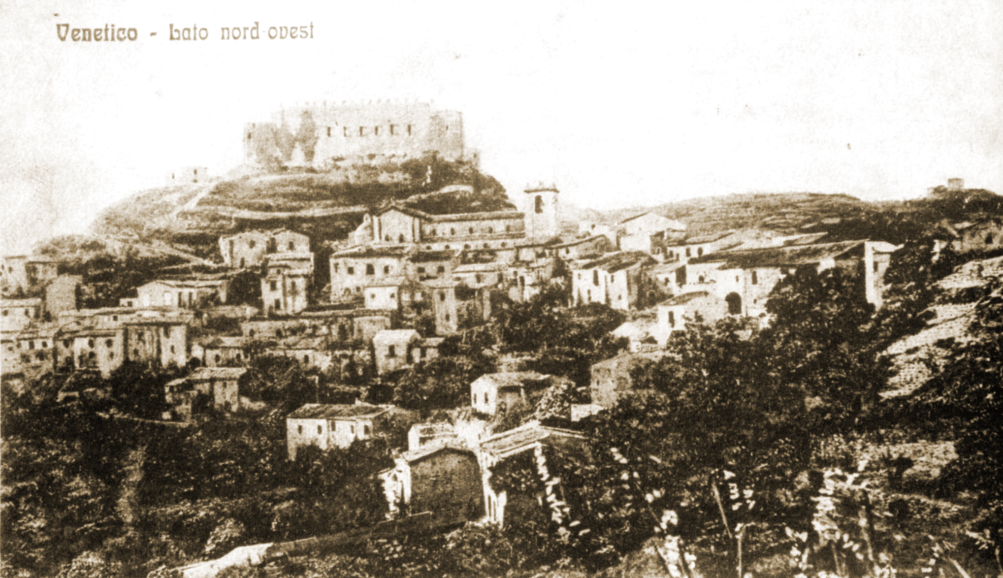 Cartolina d'epoca di Venetico Superiore risalente al XIX secolo